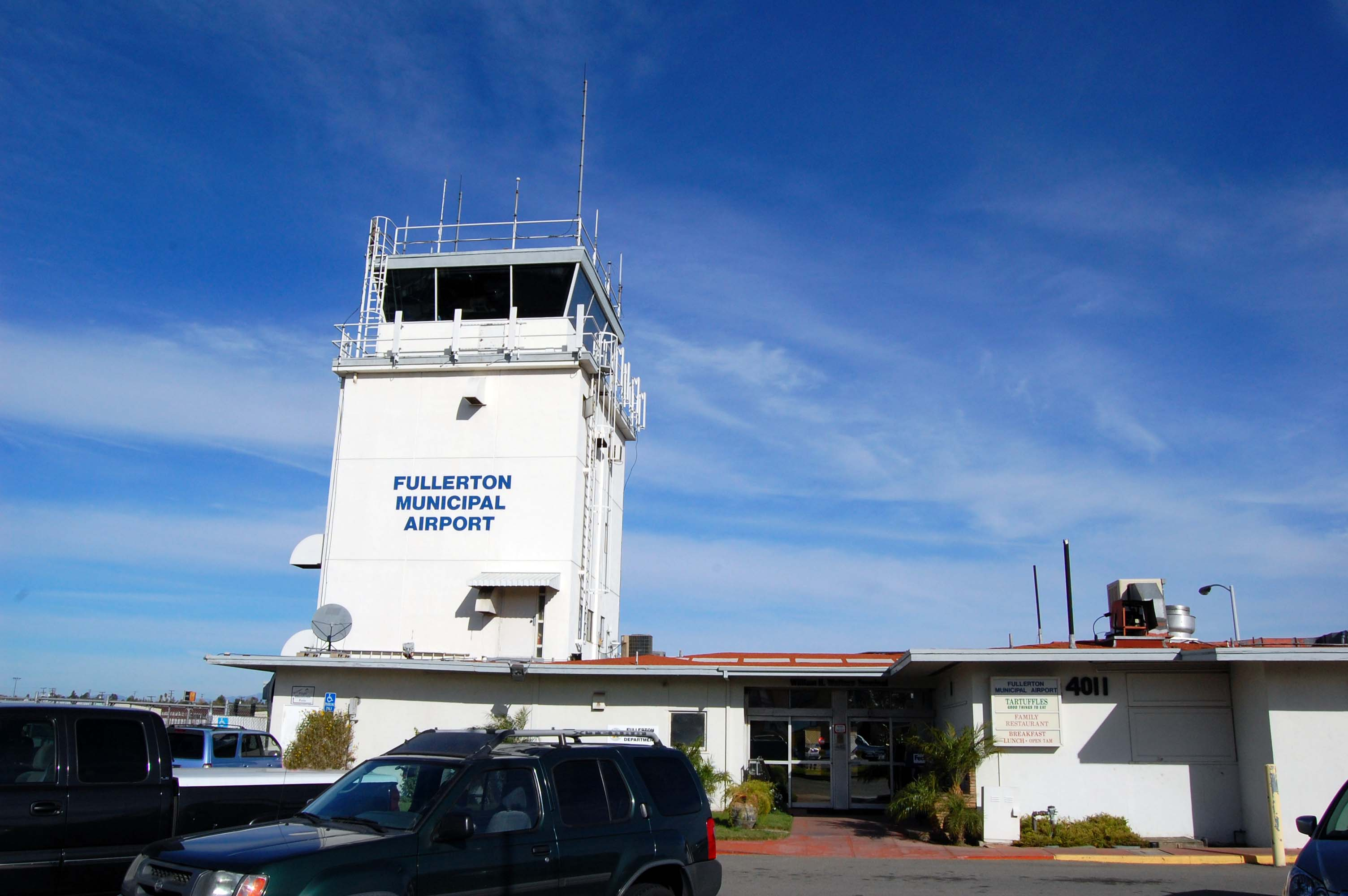 Fullerton, California, Municipal Airport